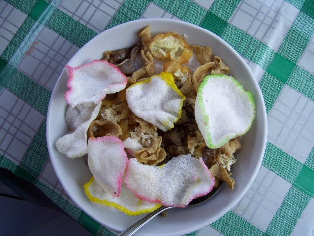 bubur ayam